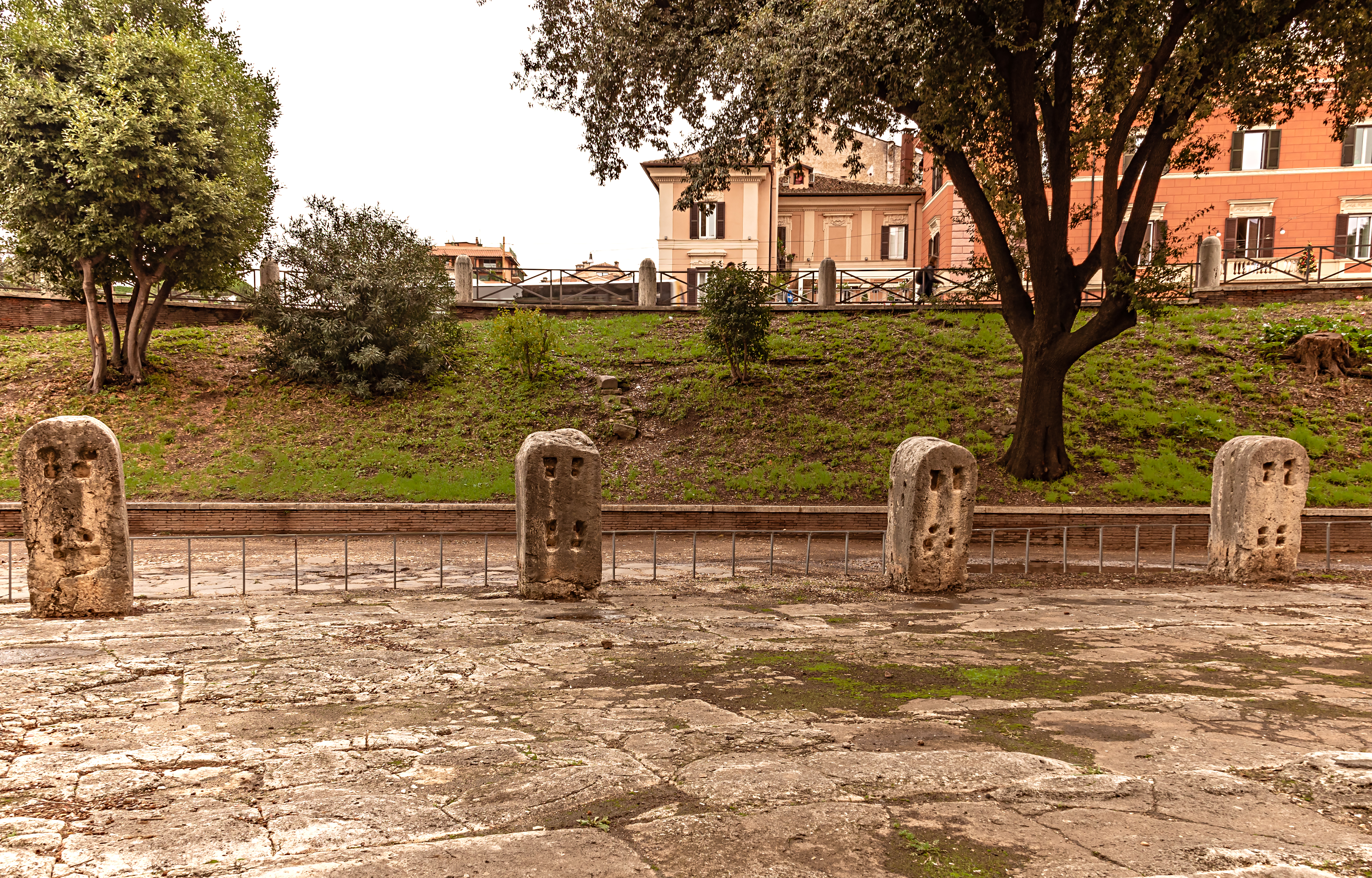 Vier von fünf Steinpollern, die sich an der Ostseite des Kolosseums befinden. Nach Abstandsberechnungen der verblieben Poller waren insgesamt 160 solcher Steine um das Kolosseum aufgestellt. In den Steinen befinden sich Aussparungen und Öffnungen. Die moderne Forschung ist sich über den Verwendungszweck der Poller uneins. Eine Meinung ist der Ansicht, dass die Taue des Velariums (Sonnensegel) dort befestigt, geführt und mit Holzwinden ein- und ausgezogen wurden. Eine andere These vertritt die Ansicht, dass in den Pollern Stangen und Ketten eingelegt waren, die den geordneten Einlass des Publikums in das Kolosseum gewährleisten sollte.